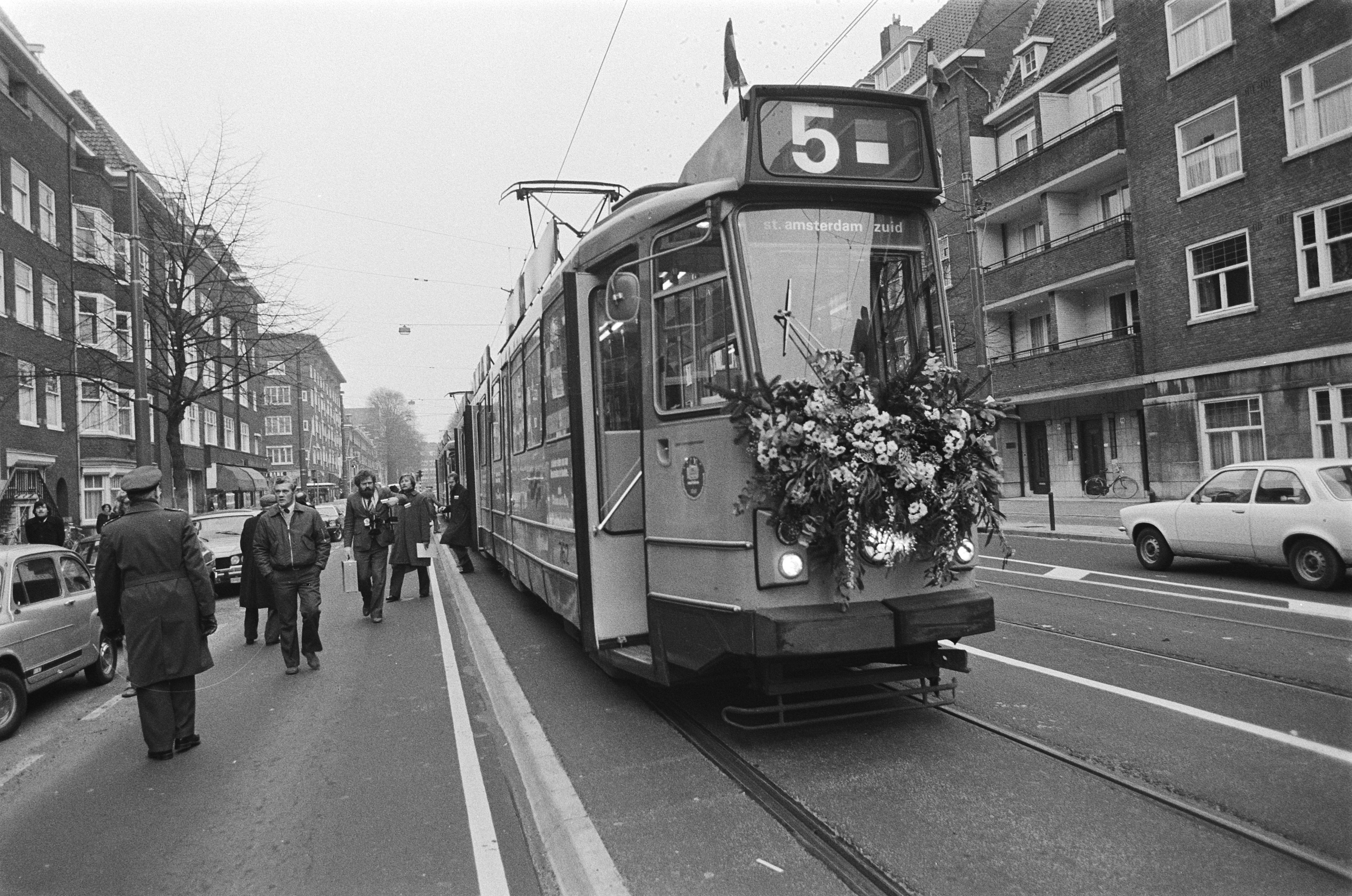 Collectie / Archief : Fotocollectie Anefo Beschrijving : Nieuwe tramlijn 5 t.b.v. Schiphollijn in gebruik genomen Fotograaf : Dijk, Hans van / Anefo Auteursrechthebbende : Nationaal Archief